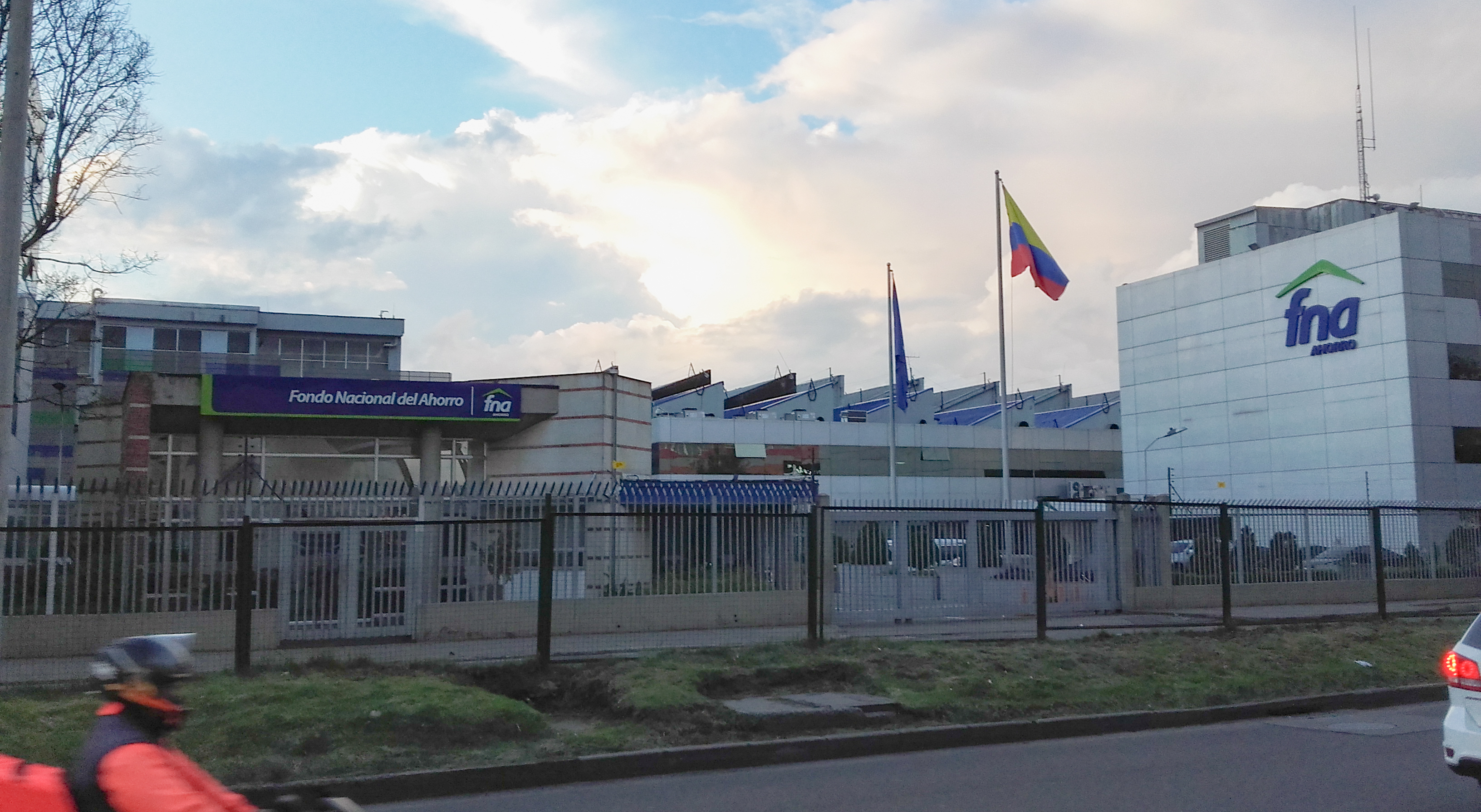 xnnffnfnnf